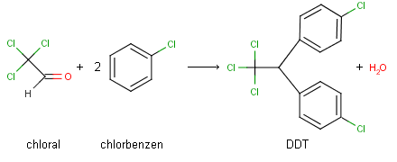 Syntéza DDT kondenzací chlaralu a chlorbenzenu